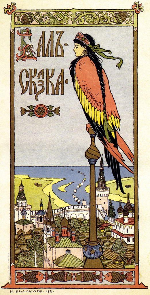 Обложка программы "Бал-сказка" ,1901г.-худ. И.Билибин